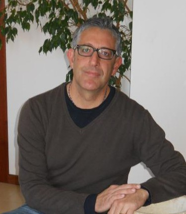 Lo scrittore Livio Romano